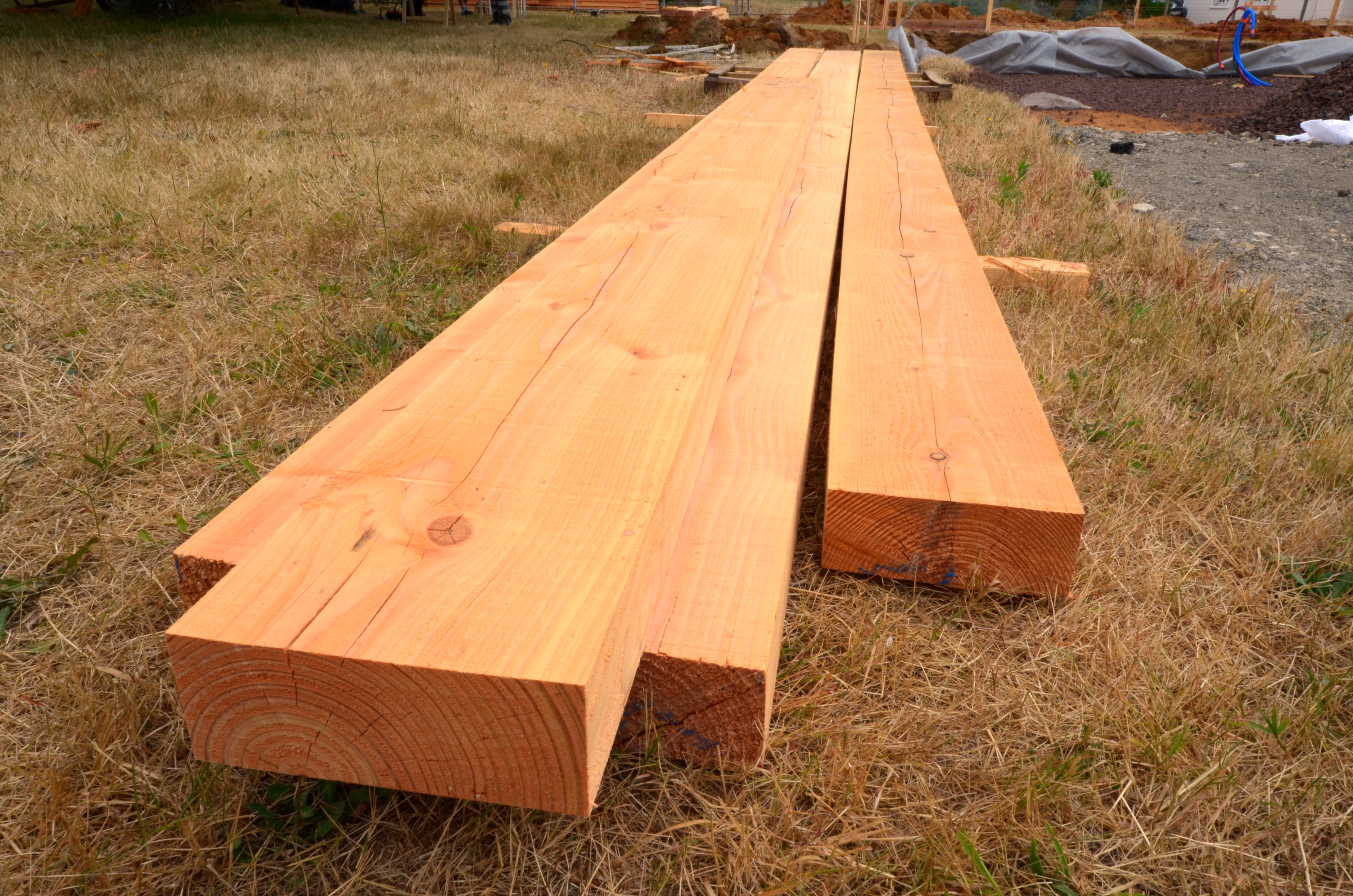 Madriers dans l'herbe